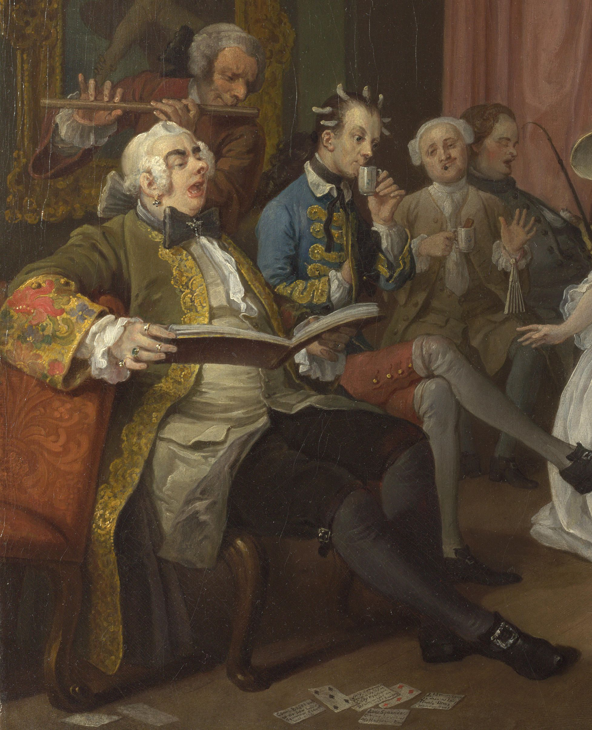 Der Kastrat Giovanni Carestini beim Morgenempfang der Mrs. Fox Lane, die von Kastraten nachweislich begeistert war und mit dem Ausruf one God, one Farinelli in die Musikgeschichte einging. Ausschnitt aus dem Bild Morgenempfang / Morgen-Lever (The Toilette), Bild 4 aus dem Zyklus Marriage à la mode von William Hogarth Ausschnitt gefertigt aus